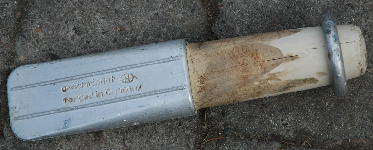 log splitter / Spaltkeil